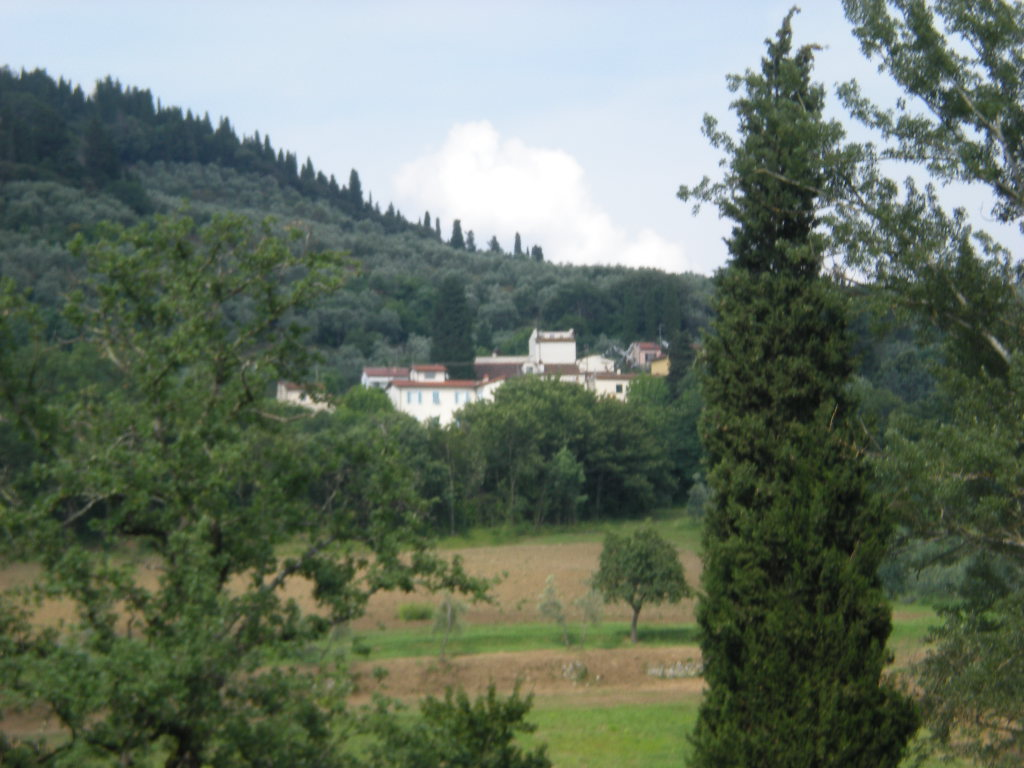 panoramica di Corbignano